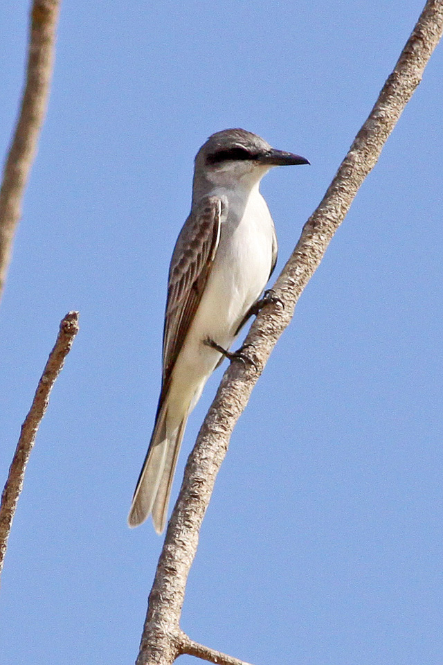 Sierra Baerucu National Park & Lago Er